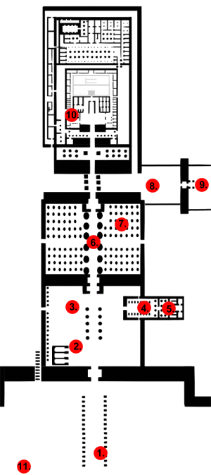 Skica Karnaka - opomba: nastala je iz fotografije table posnete pred vhodom v tempelj, s kontrastom izluščen načrt in ročno korigiran. Kategorija:Zemljevidi